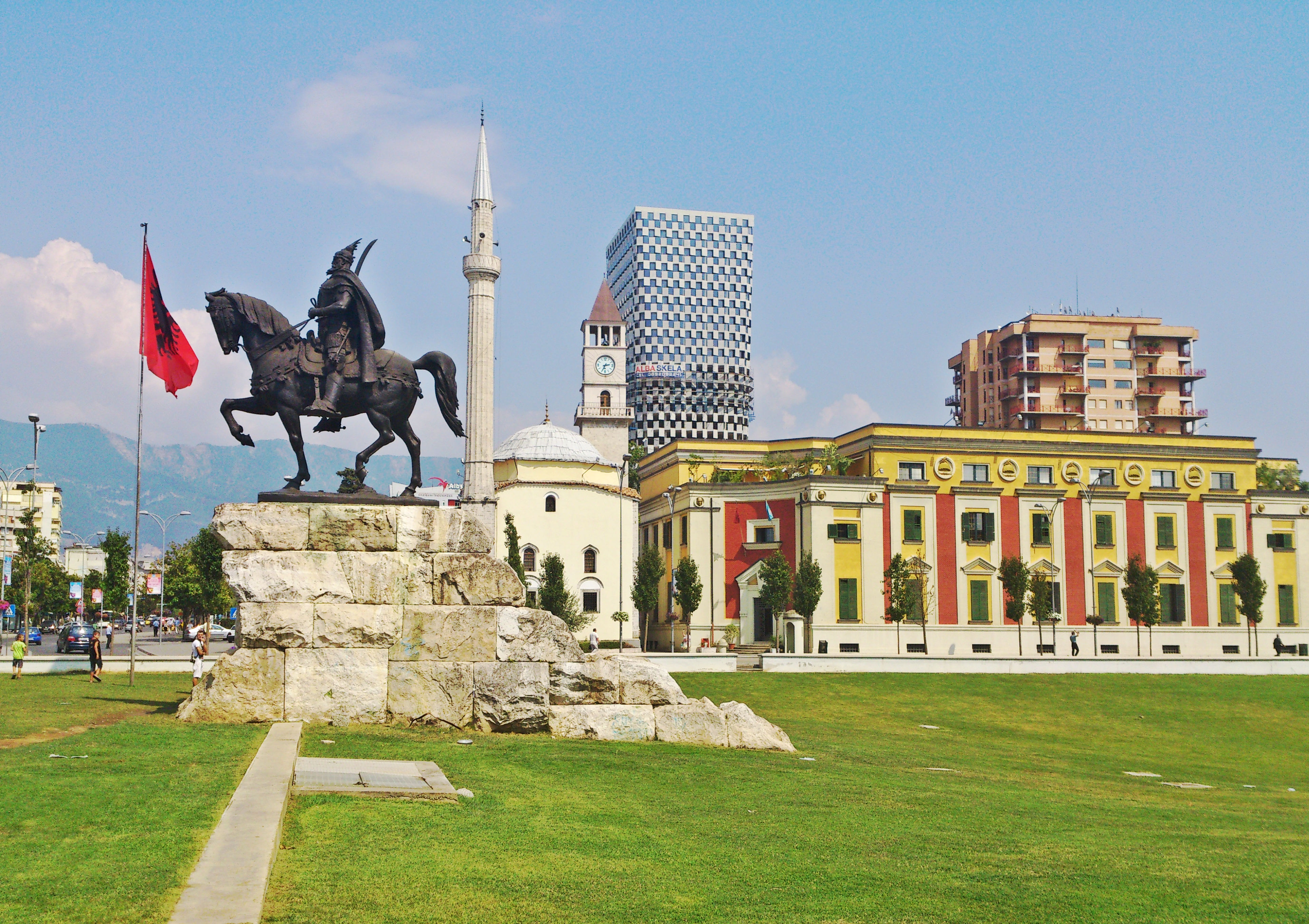 Площадь Скендербега в Тиране